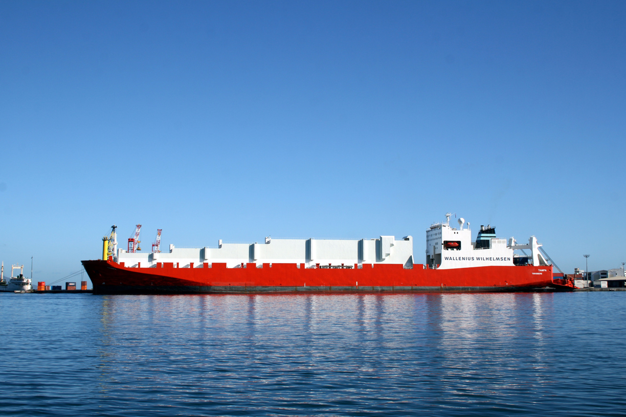 Le MV Tampa de Wallenius Wilhelmsen à Papeete IMO Number: 8204951 MMSI Number: 257497000 Callsign: LMWO3 Length: 262 m Beam: 32 m